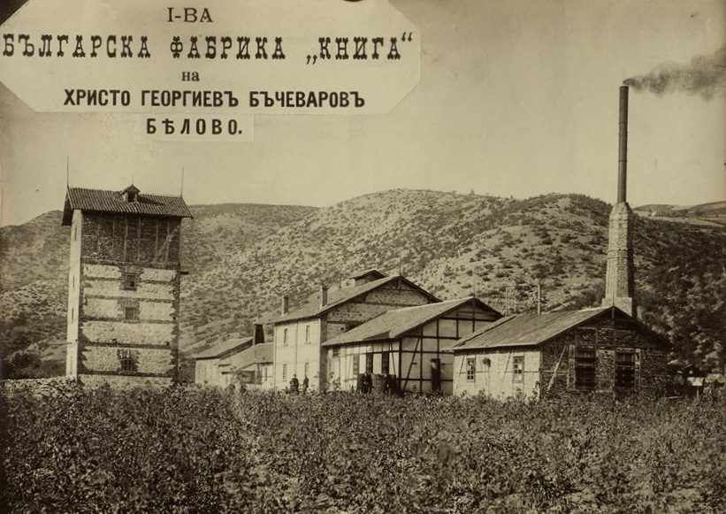 Първа българска фабрика за мукава и хартия за опаковане „Книга“ на Хр. Г. Бъчеваров в Белово. Основана в 1900 г. с основен капитал 300 000 лева, с 20-50 работници. През 1912 г. е с основен капитал 300 000 лева и 20-50 работници. Фотоалбум с фотографии на български индустриални предприятия от периода 1887-1912 г., подарен от Съюза на българските индустриалци на цар Фердинанд І по случай 25-годишнината от възшествието му на българския престол.